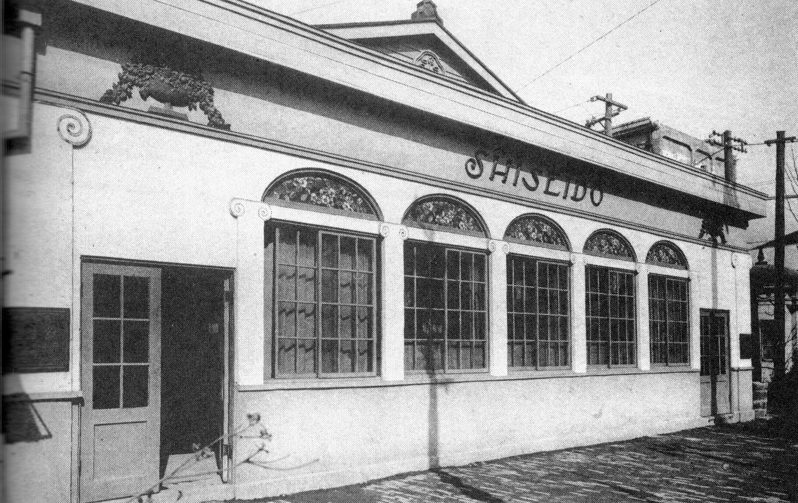 関東大震災後の銀座に建てられた、川島理一郎設計の資生堂仮設店舗。